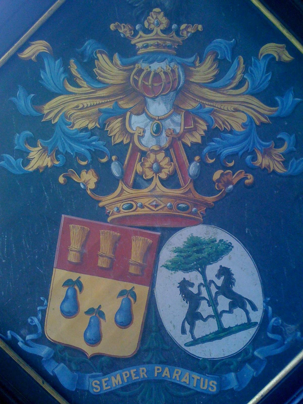 Armoirie et blasons de la famille Peers de Nieuwburgh